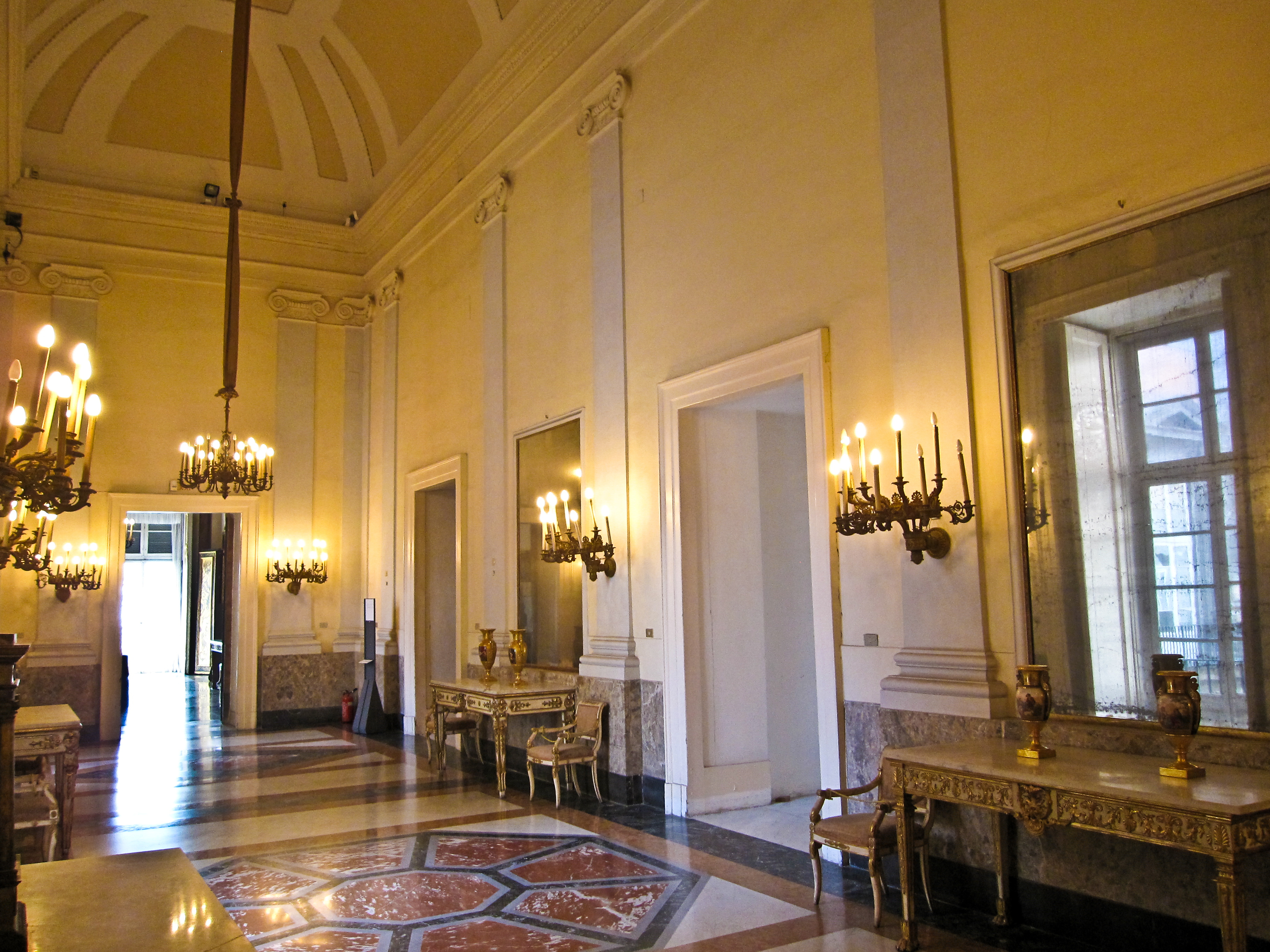 Appartamento storico